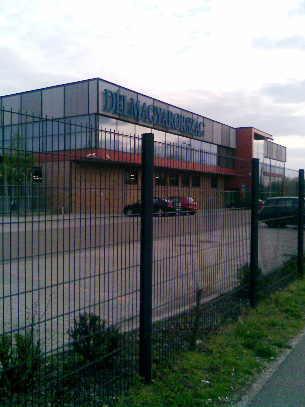 A Délmagyarország Szabadkai úti sajtóháza Szegeden